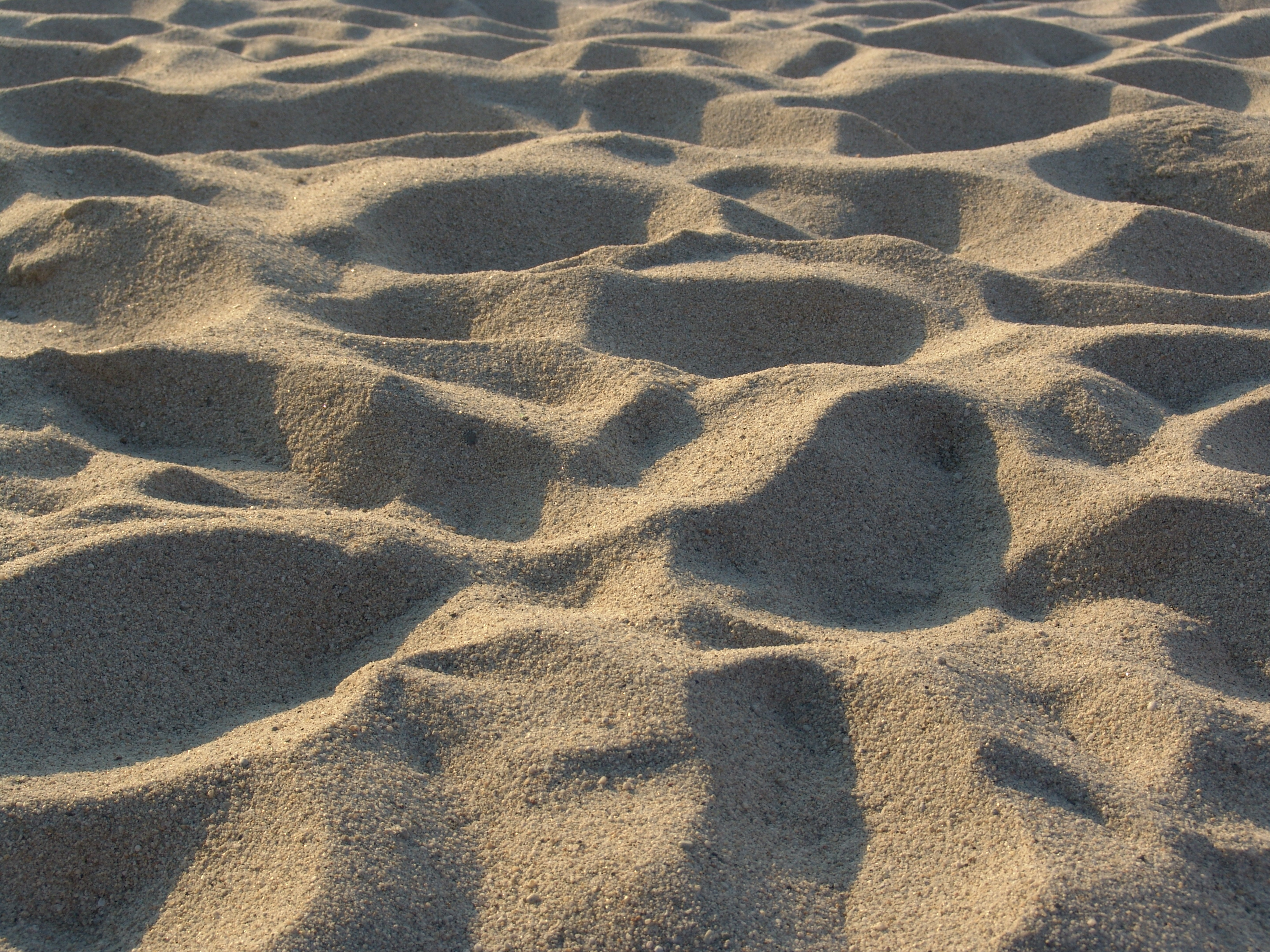 wikipedia